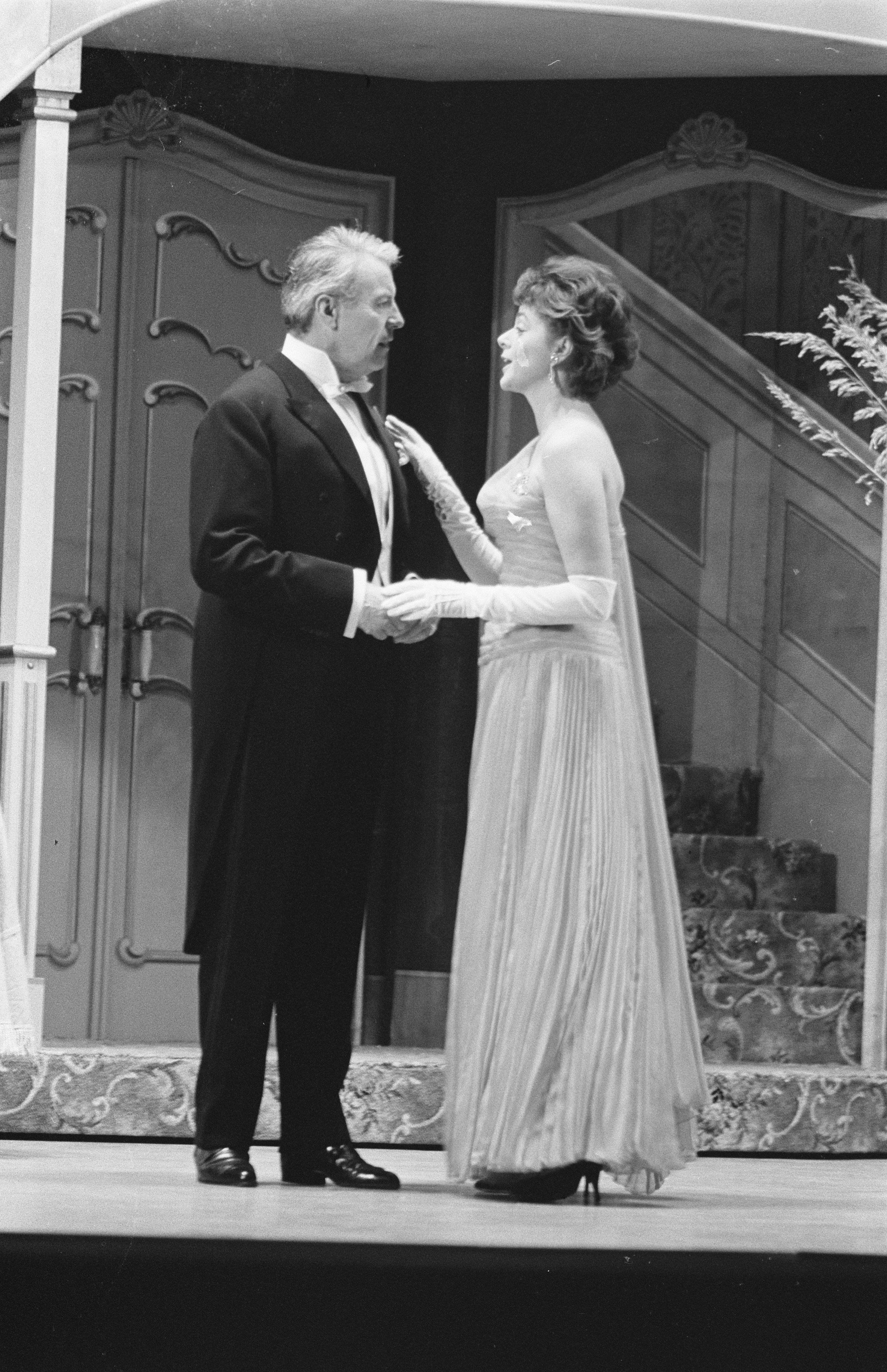 Collectie / Archief : Fotocollectie Anefo Reportage / Serie : [ onbekend ] Beschrijving : Musical "The Sound of Music", repetities in Carré , de feestscene met kinderen, Johan Heesters met Teddy Scholten [als Elsa Schräder] Datum : 24 januari 1964 Locatie : Amsterdam, Noord-Holland Trefwoorden : acteurs, actrices, musicals, zangeressen, zangers Persoonsnaam : Heesters, Johannes, Scholten, Teddy Fotograaf : Pot, Harry / Anefo Auteursrechthebbende : Nationaal Archief Materiaalsoort : Negatief (zwart/wit) Nummer archiefinventaris : bekijk toegang 2.24.01.05 Bestanddeelnummer : 915-9845